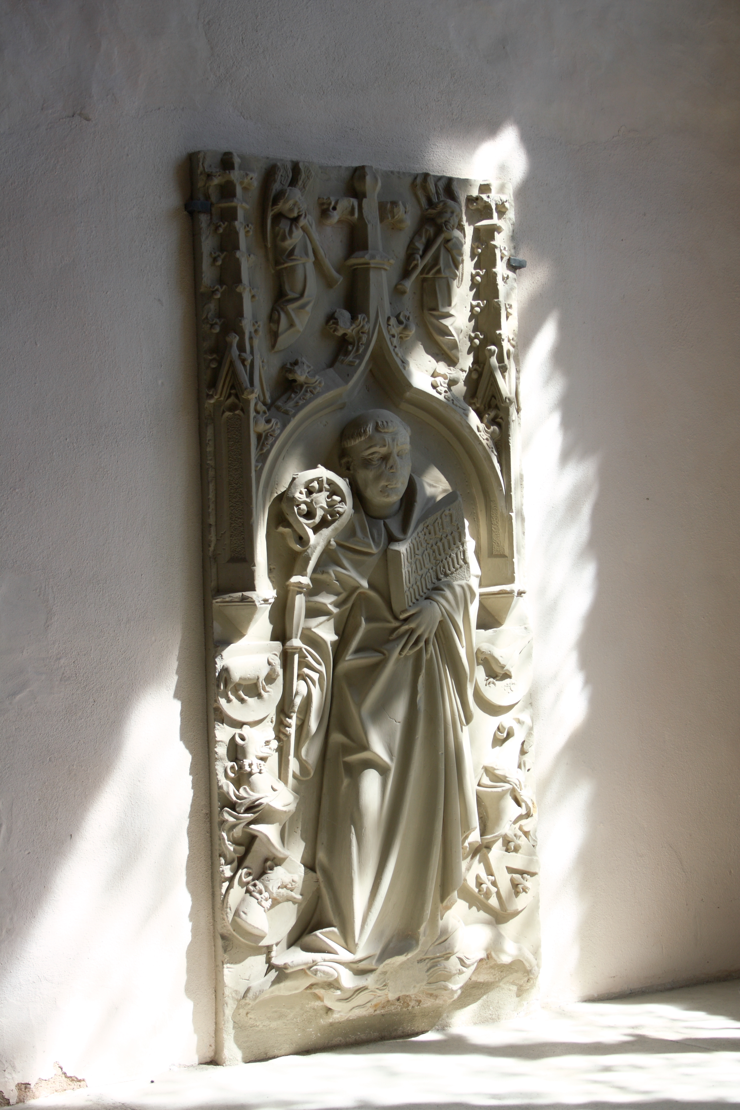 Evangelische Pfarrkirche, ehemalige Benediktinerklosterkirche St. Maria in Auhausen im Landkreis Donau-Ries (Bayern), Grabmal des Abtes Wilhelm de Lacu (1422−1450), um 1460; mit Schrifttafel